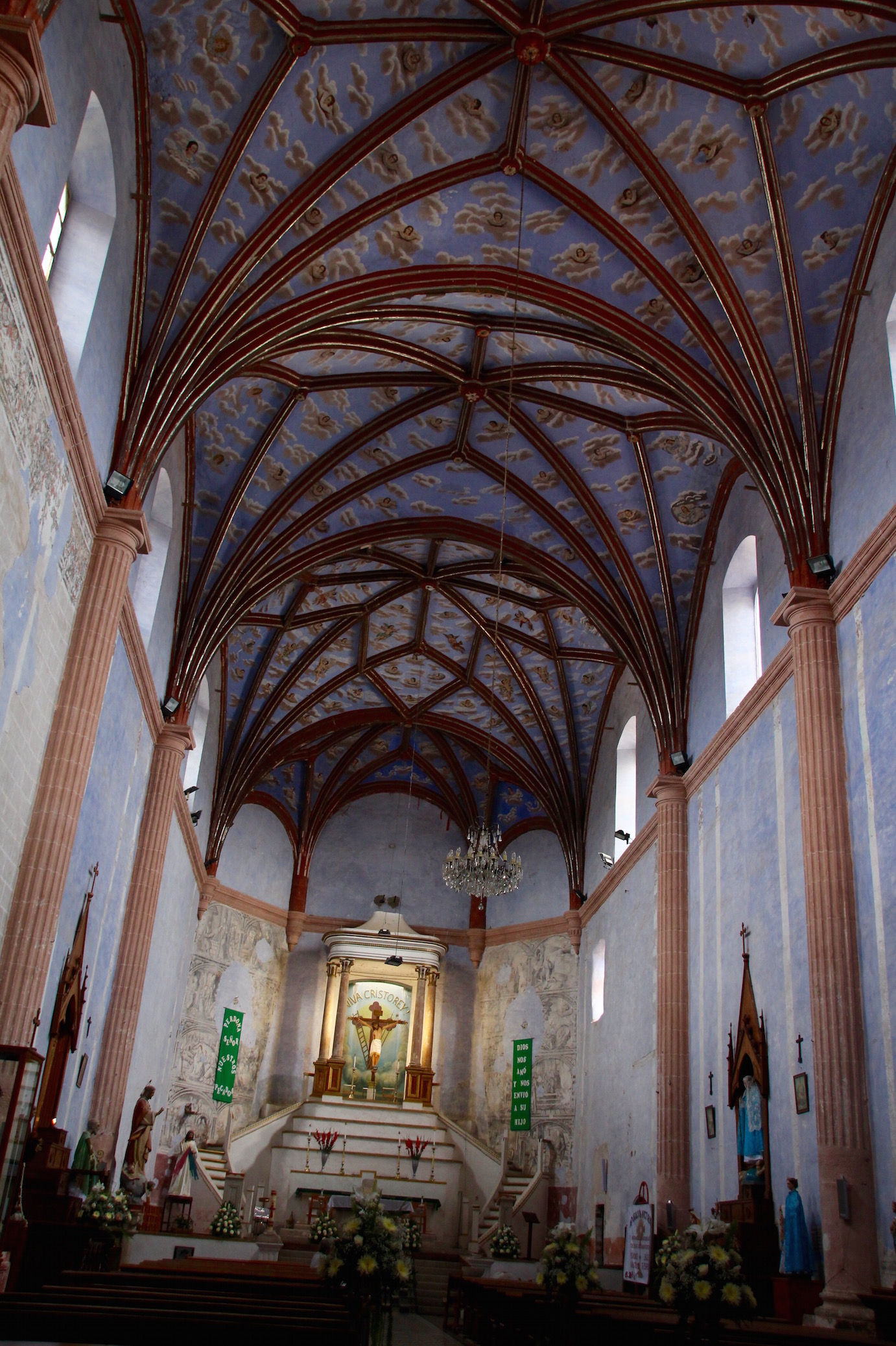 Vista interior de la Parroquia de Todos Santos, Zempola